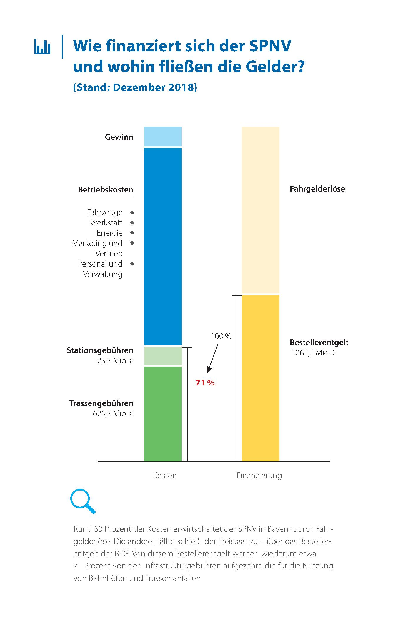 Grafik: Finanzierunng des Schienenpersonennahverkehrs